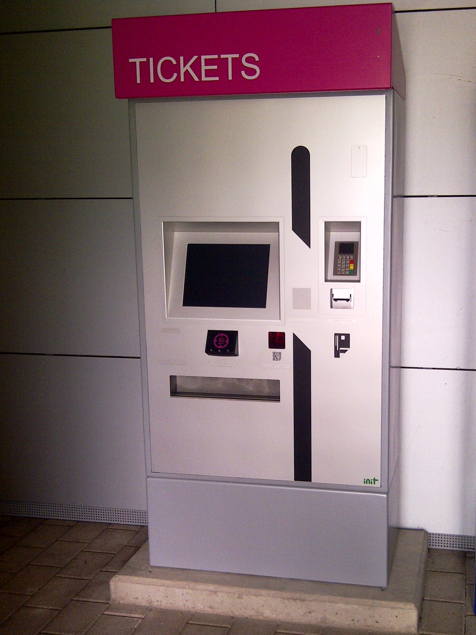 E Verklasapparat fir elektronesch Ticketen mKaart.